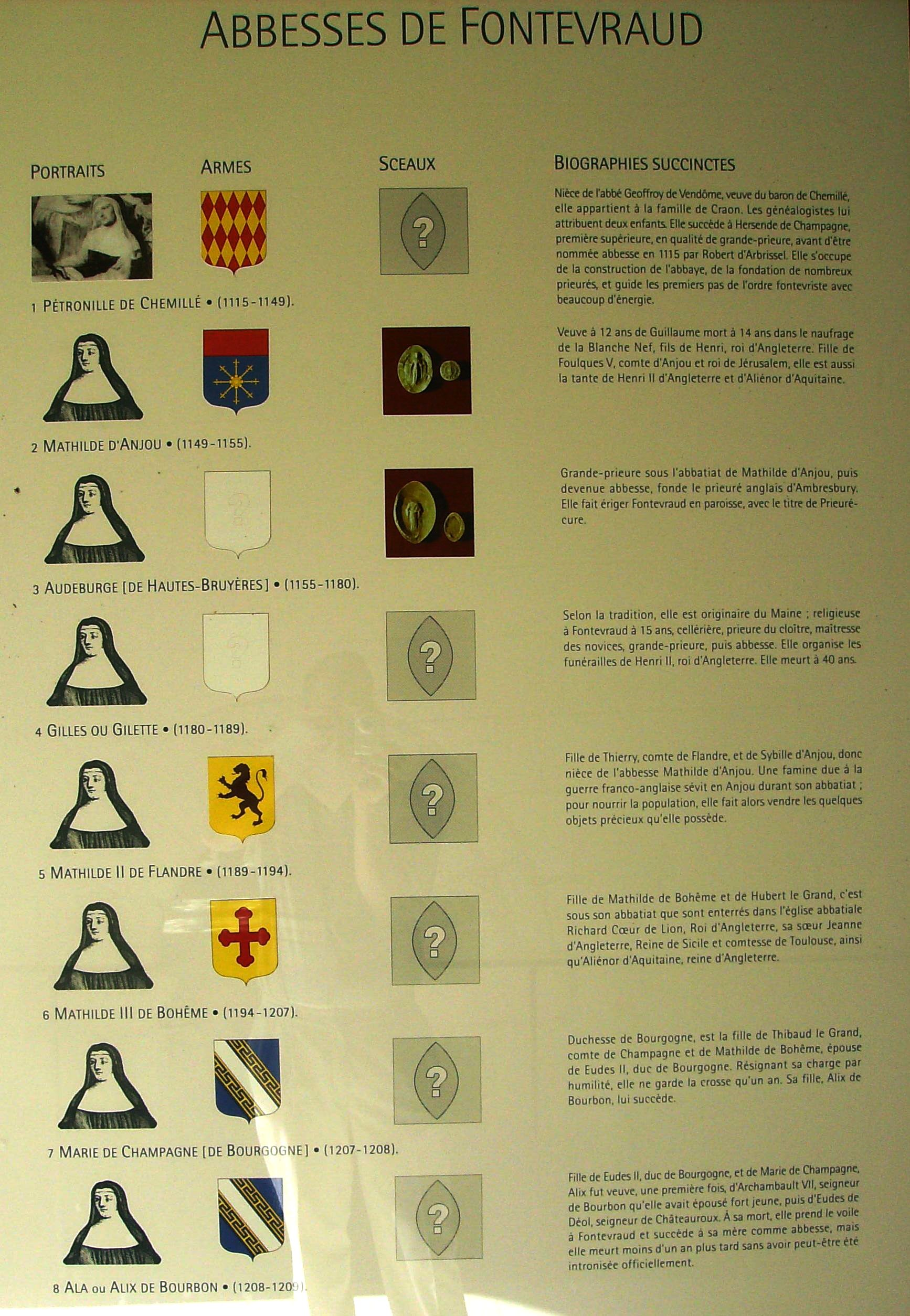 Liste des abesses de Fontevraud - infographie